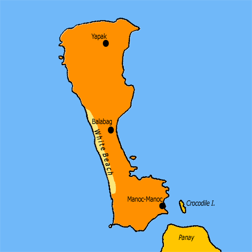 Karte Boracay